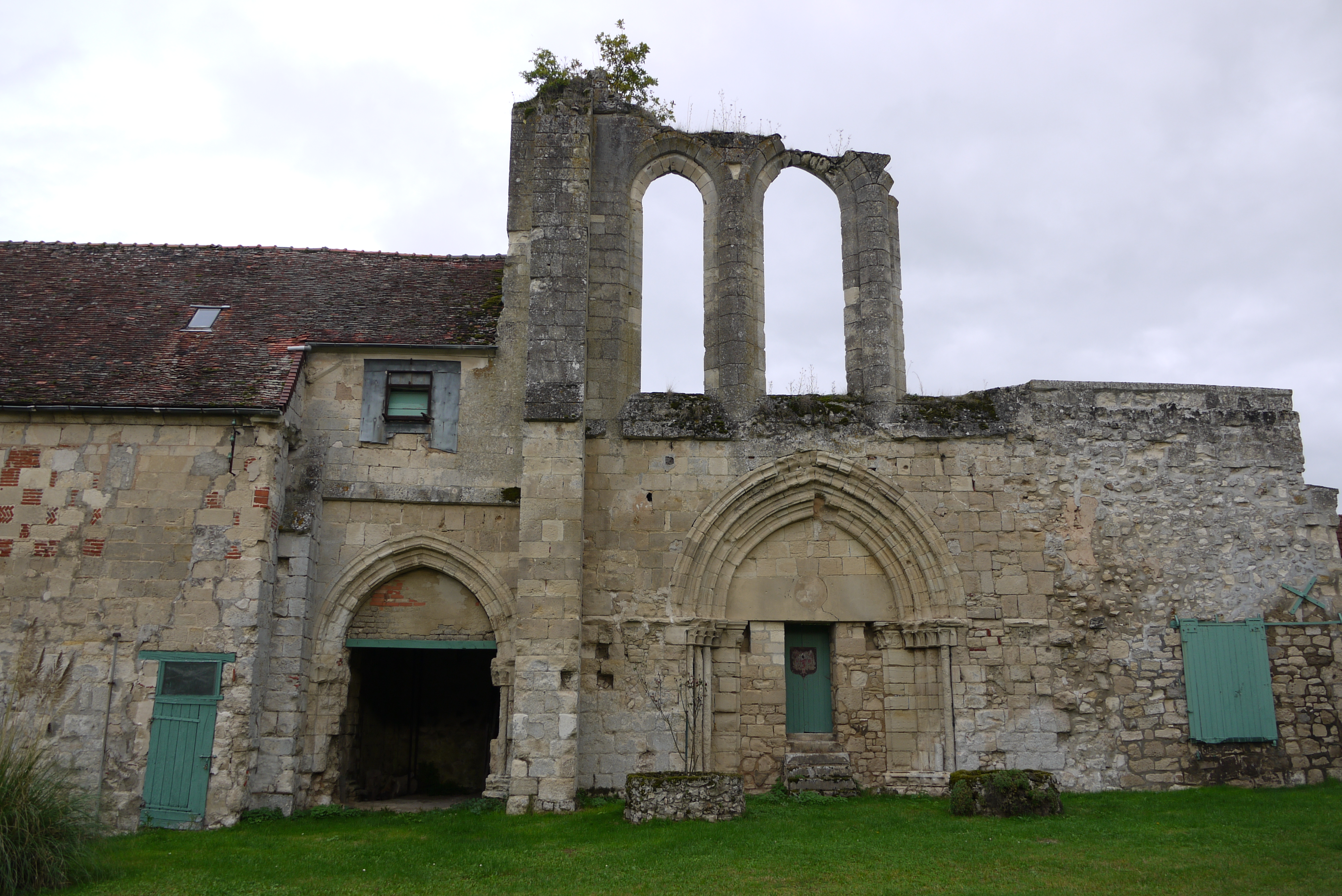 Ruines de l'abbaye du Val-Chrétien, à Bruyères-sur-Fère.